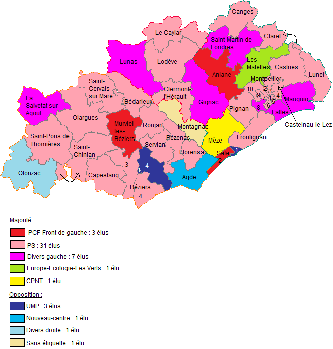 Étiquettes politiques des conseillers généraux de l'Hérault suite aux cantonales de 2011